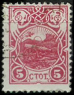 Почтовая марка Болгарии в честь 25-летия Апрельского национально-освободительного восстания